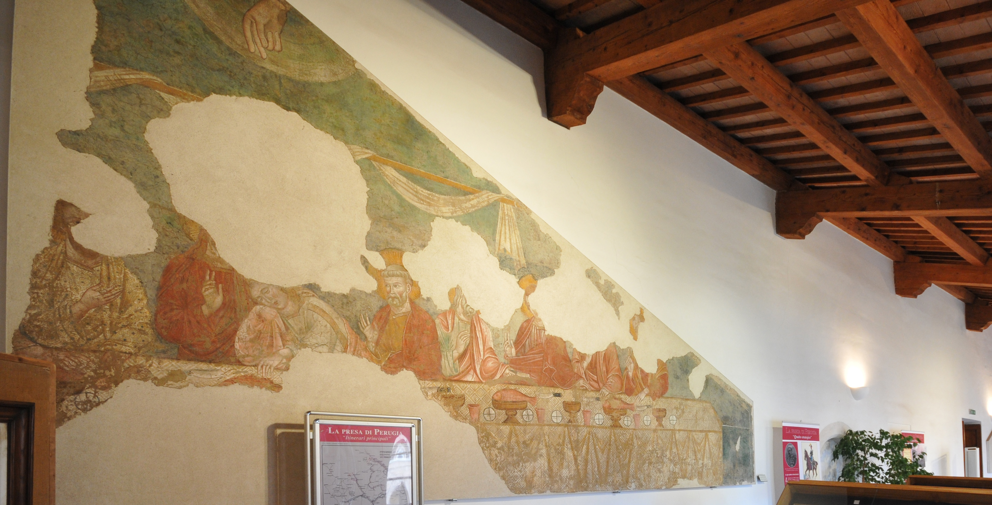 Affresco ultima cena proveniente dall'ex refrettorio del Monastero di Santa Giuliana PG